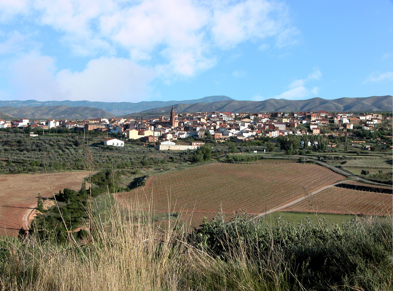 Tudelilla (La Rioja, España)